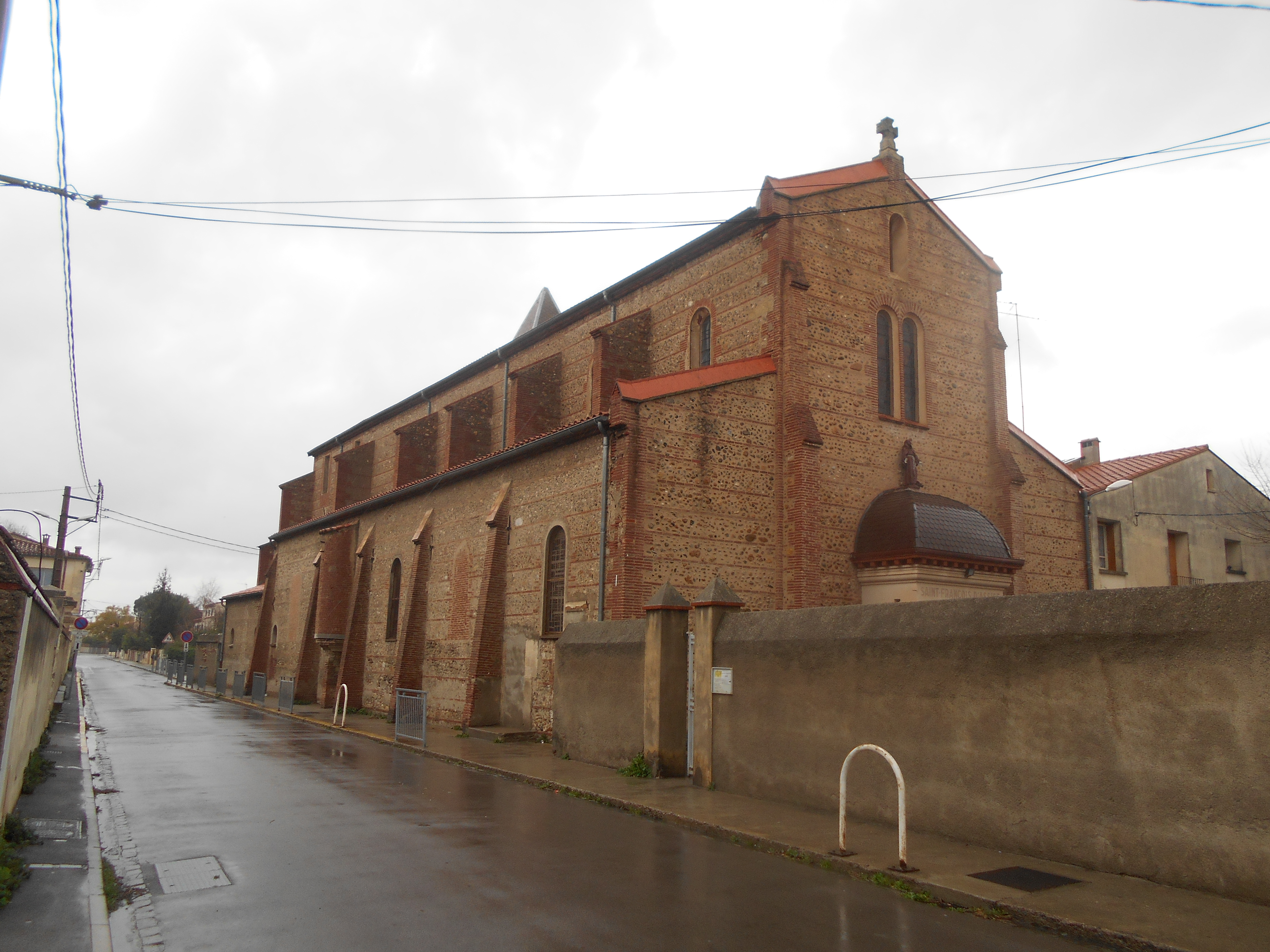 L'església parroquial de Sant Lluís Gonzaga de Perpinyà, al Baix Vernet